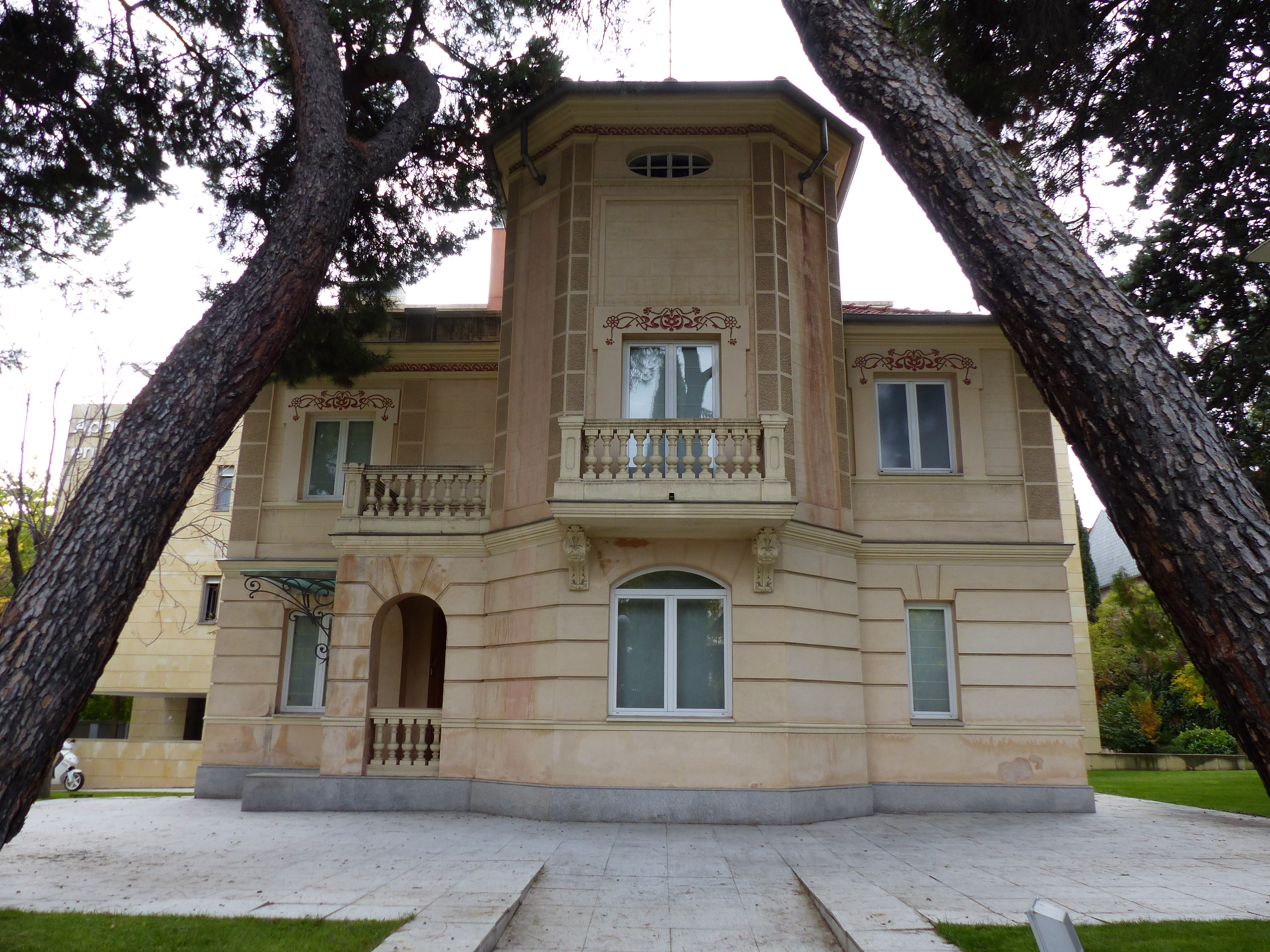 Fachada de una de las casas de clase alta, con elementos de art noveau en la fachada.